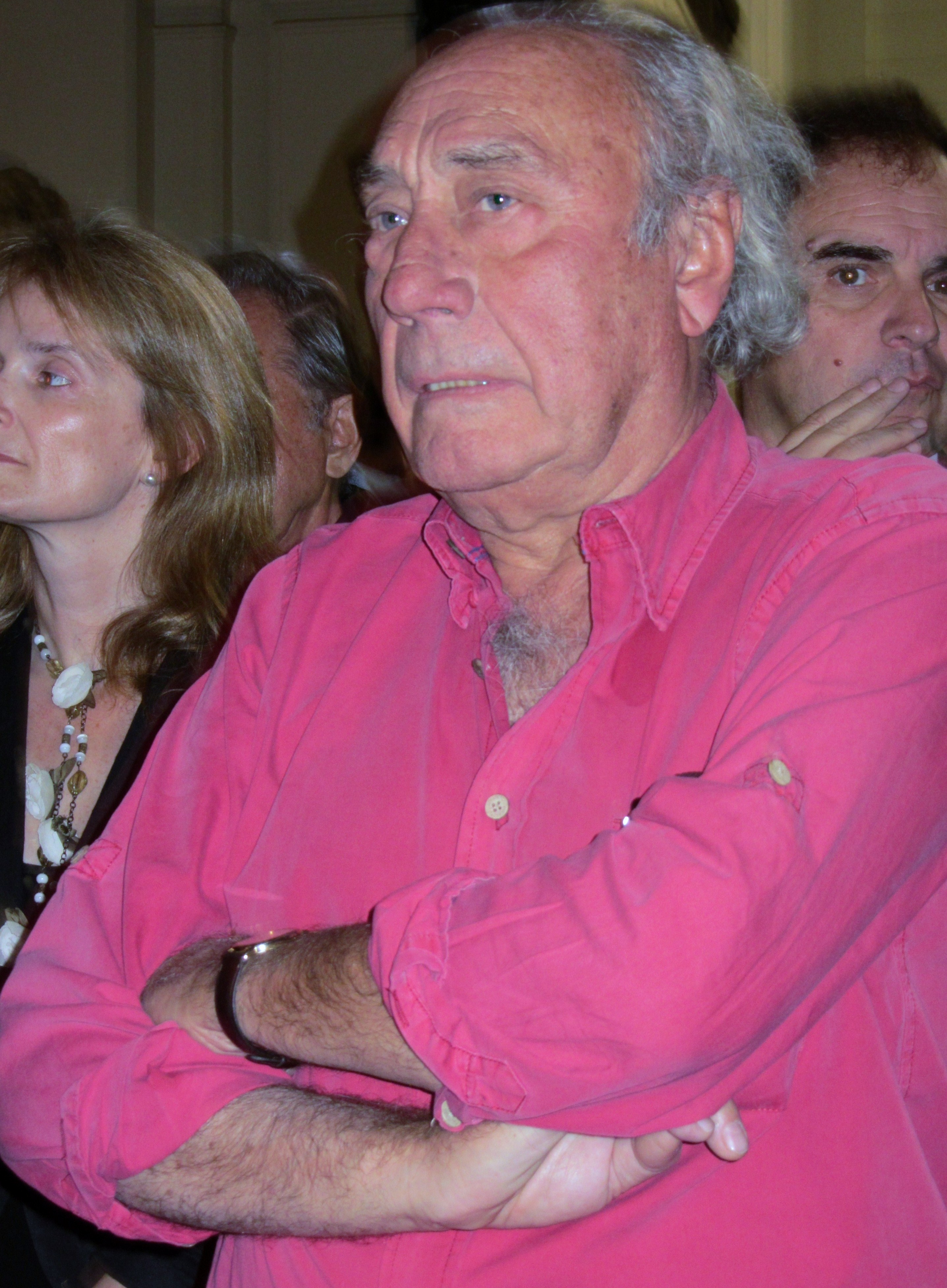 El escultor chileno Gaspar Galaz en la inauguración de la exposición de José Gil de Castro el 1 de abril de 2015 en Santiago, en el Museo Museo de Bellas Artes de Chile